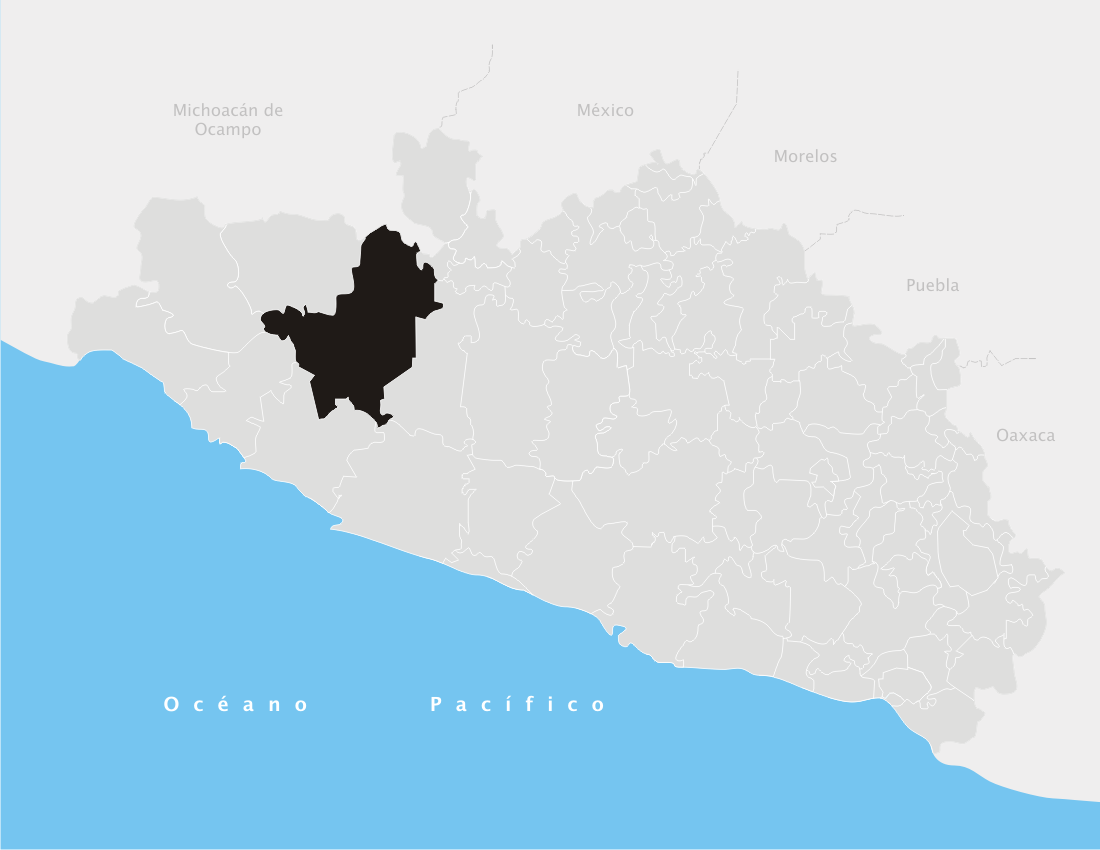 Coyuca de Catalán en el estado de Guerrero (México)